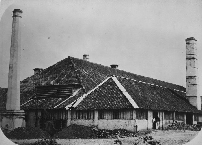 Foto. Suikerfabriek Wringin-Agung, Tuban